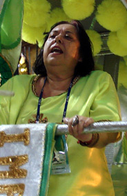 Rosa Magalhaes, carnavalesca